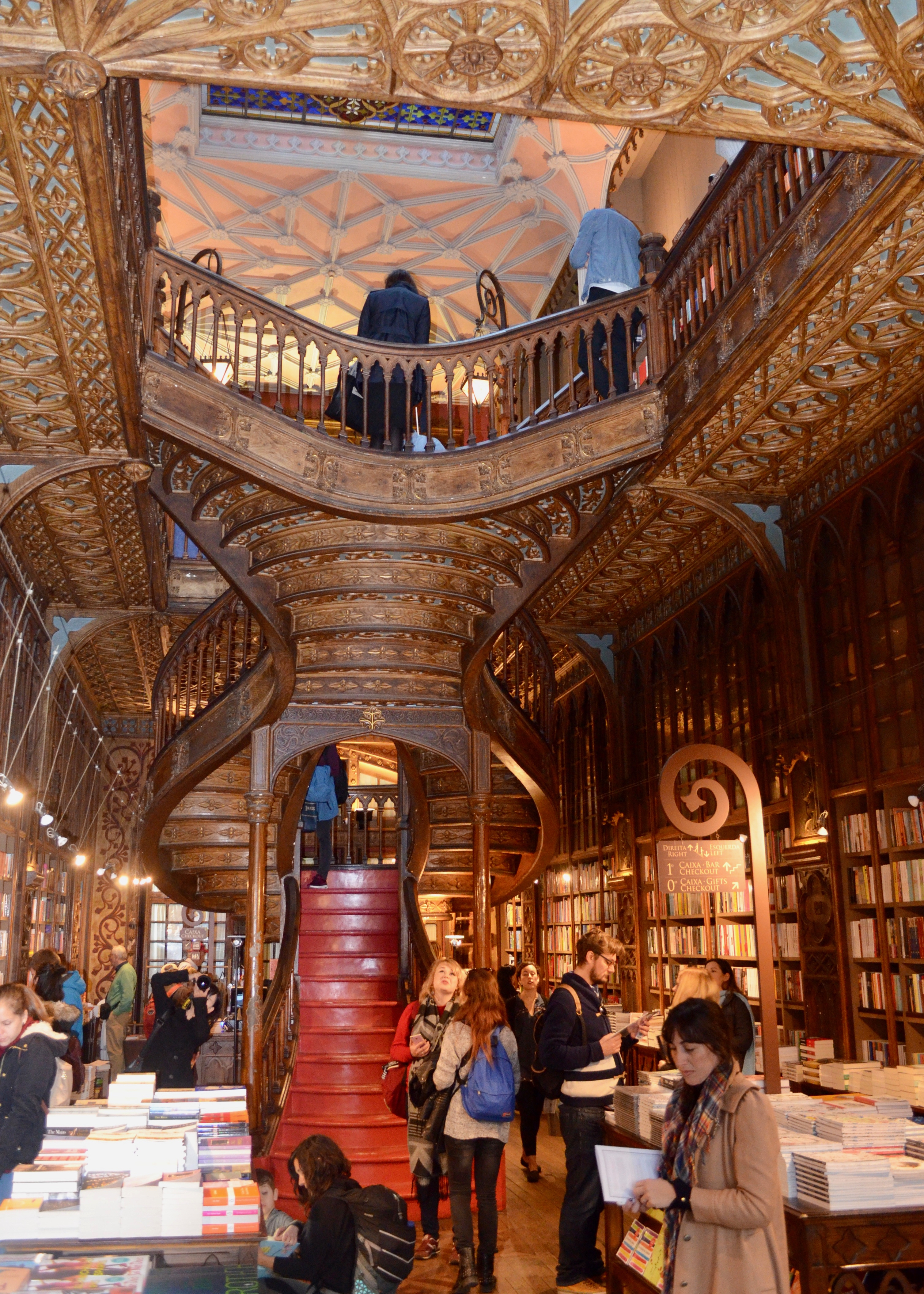 Porto, Portugal